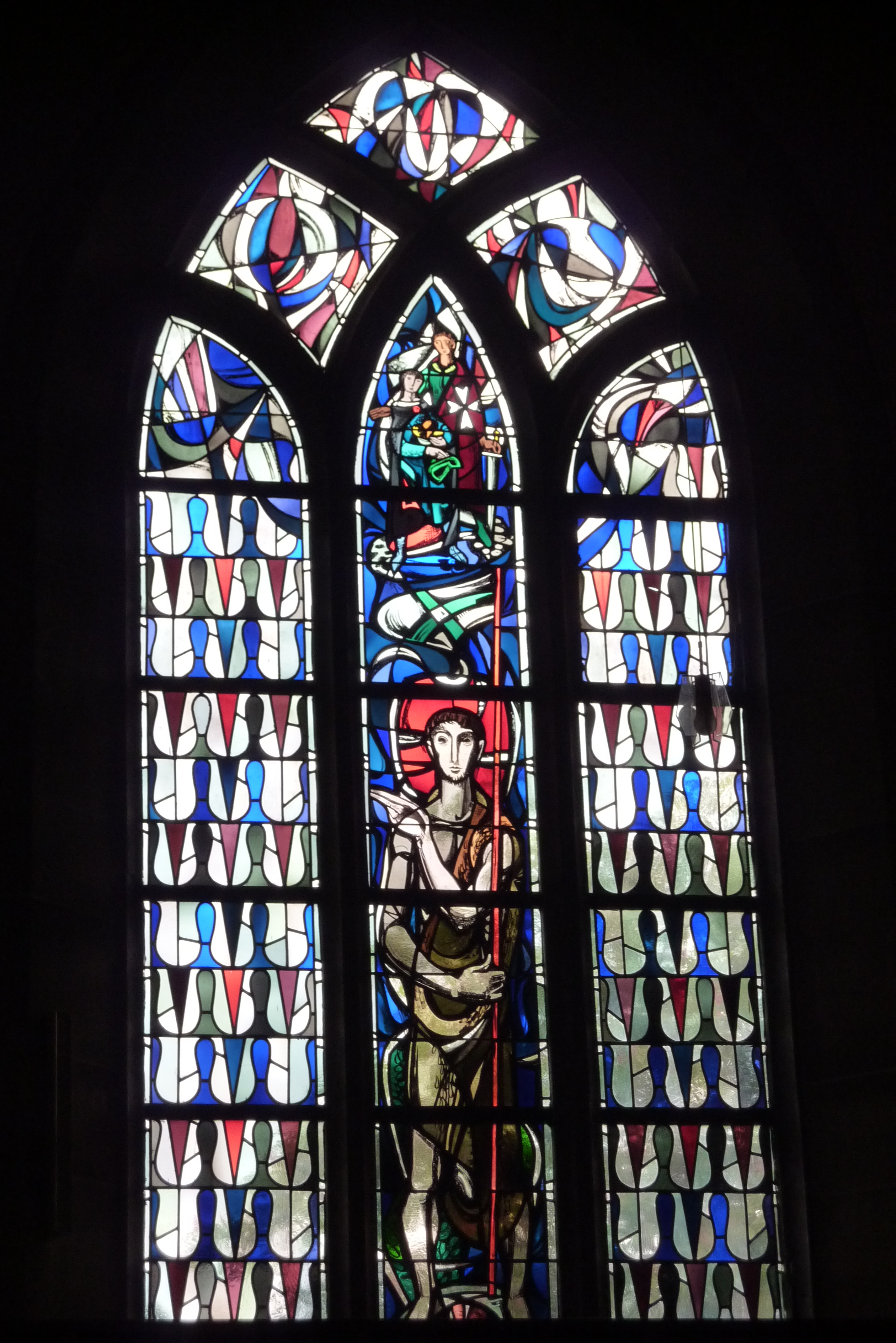 Glasfenster in der katholischen Pfarrkirche St. Johannes der Täufer in Adenau, Darstellung:Johannes der Täufer